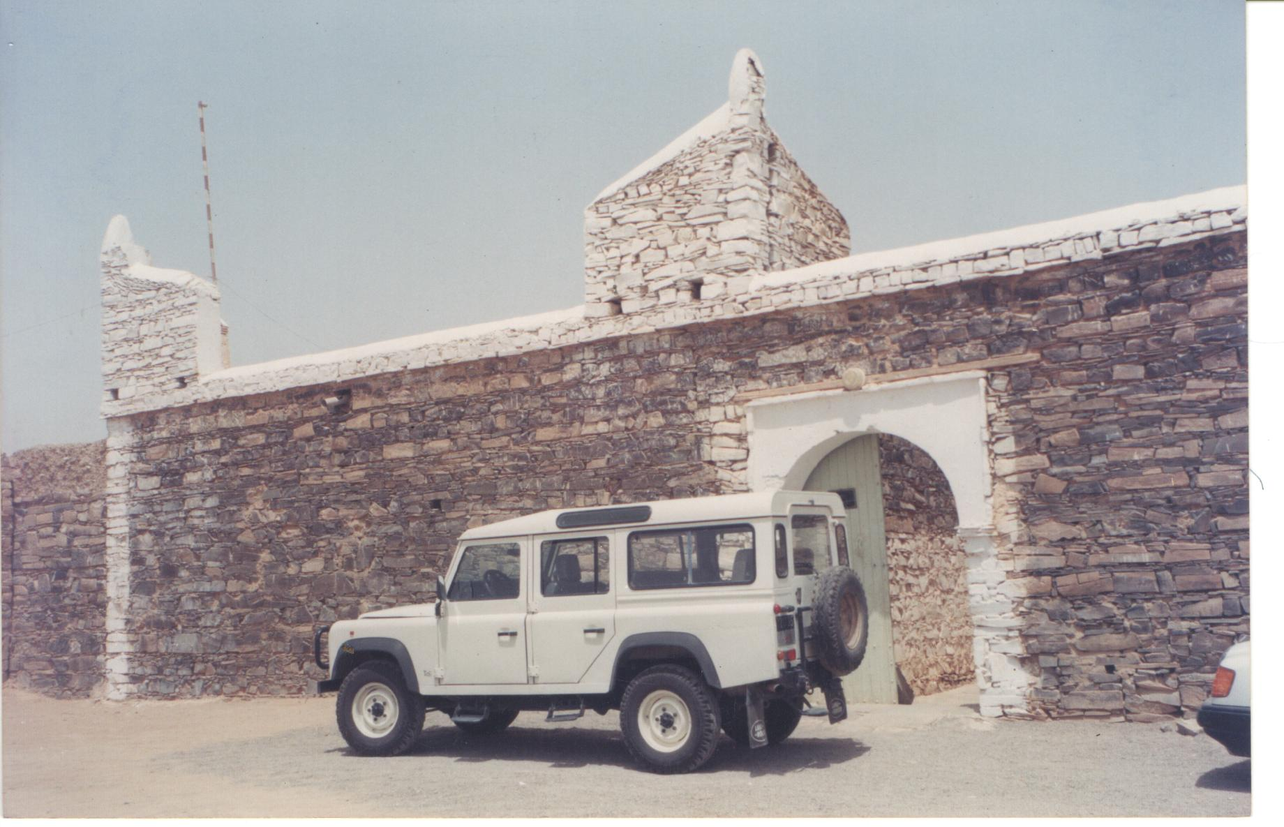 La façade principale